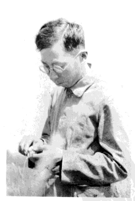 俞大绂在金陵大學工作時，在田間觀察小麥